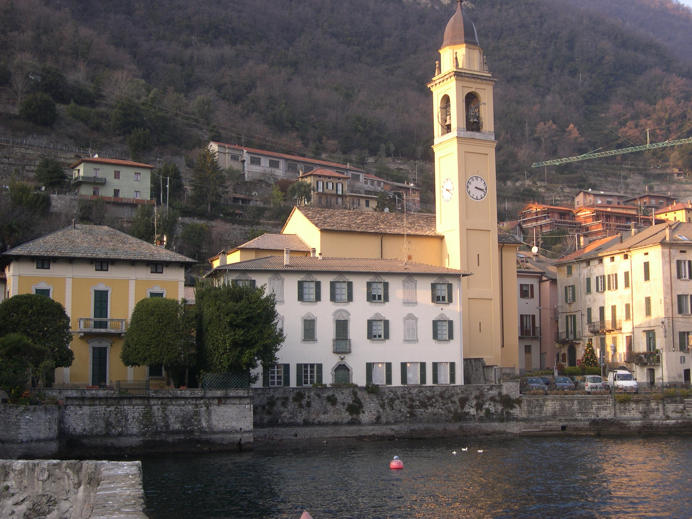 Panorama di Laglio